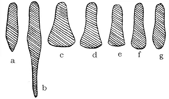 sabatons evolution by Wendelin Boeheim: а) 1290—1390. b) 1300—1490. с) 1500—1530. d) 1530—1540. е) 1540—1550. f) 1550—1560. g) 1560—1590.